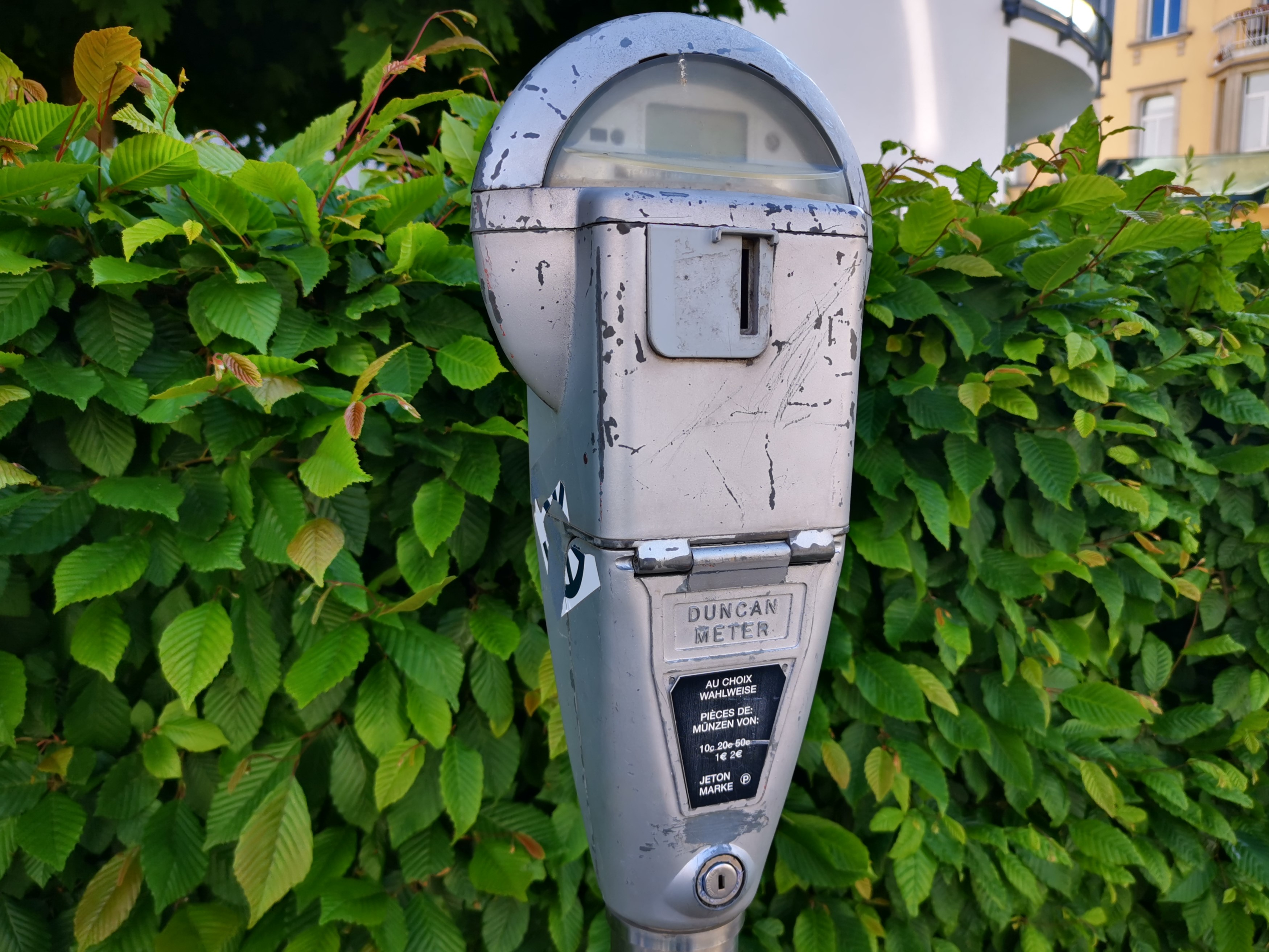 Luxembourg. Parcmètre du fabricant américain "Duncan meter" à Limpertsberg, avenue Pasteur.